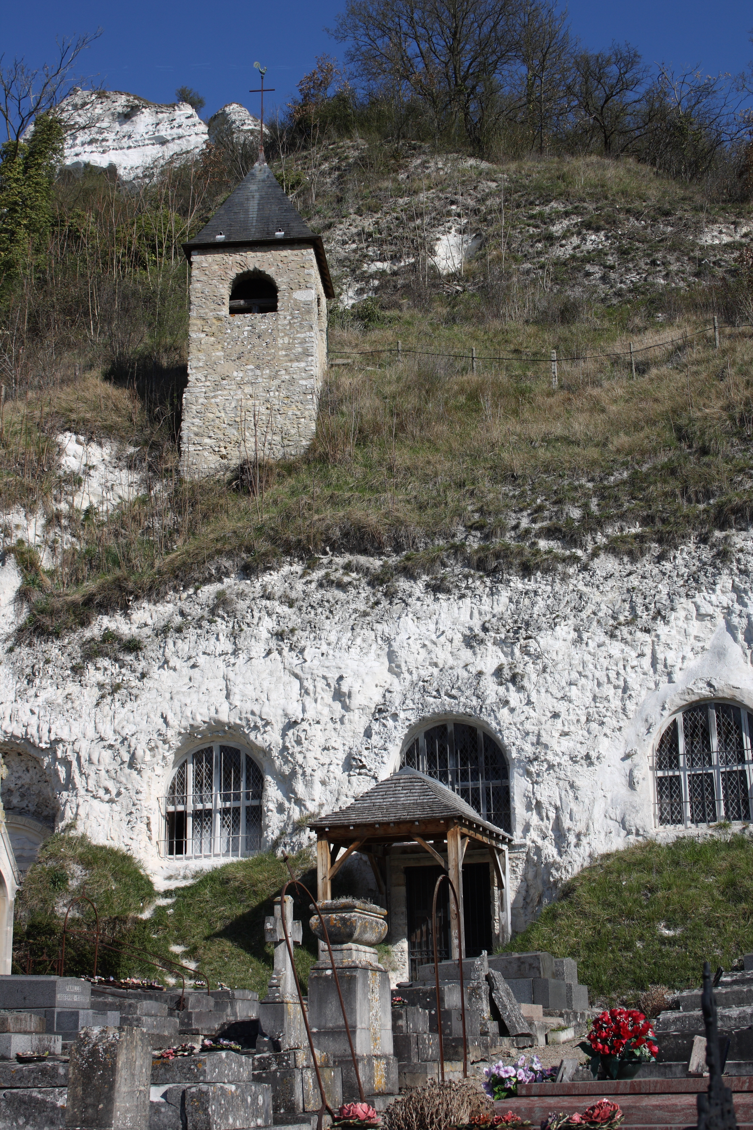 Église de l'Annonciation in Haute-Isle